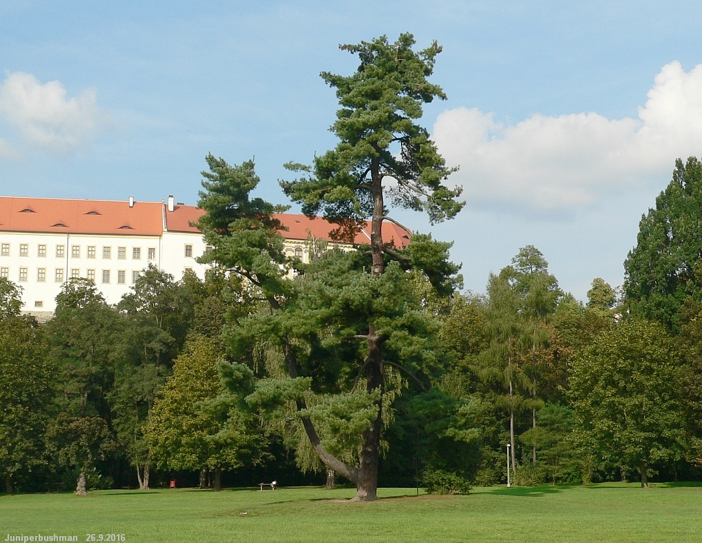 Borovice Schwerinova na Mariánské louce v Děčíně.